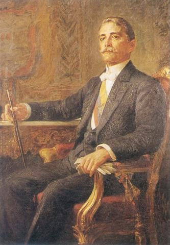 Carlos Eugenio Restrepo Restrepo President of Colombia.